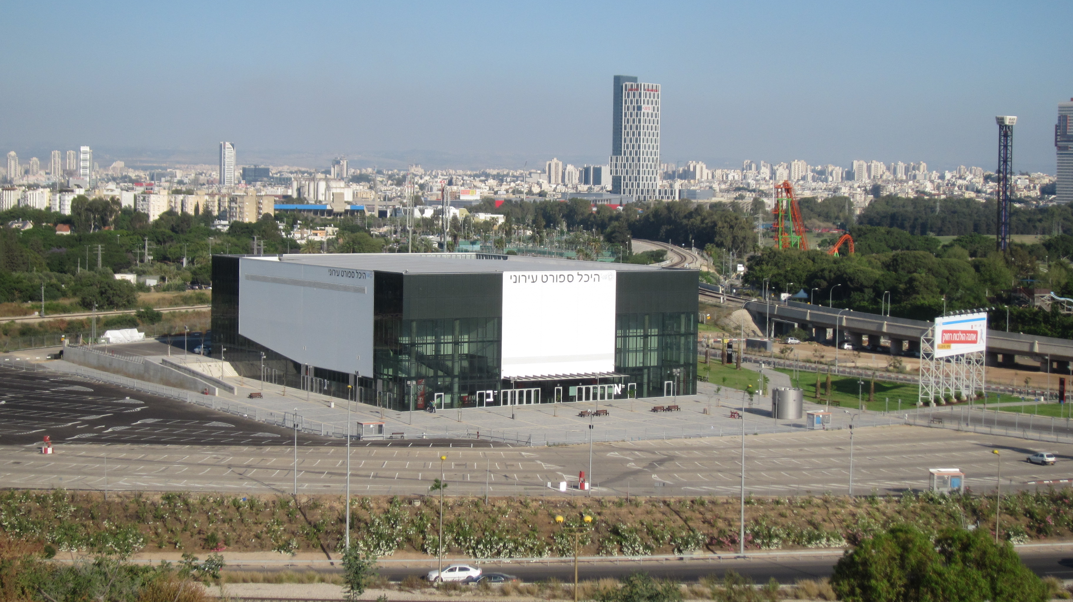 היכל הספורט העירוני (אולם הדרייב אין) תל אביב